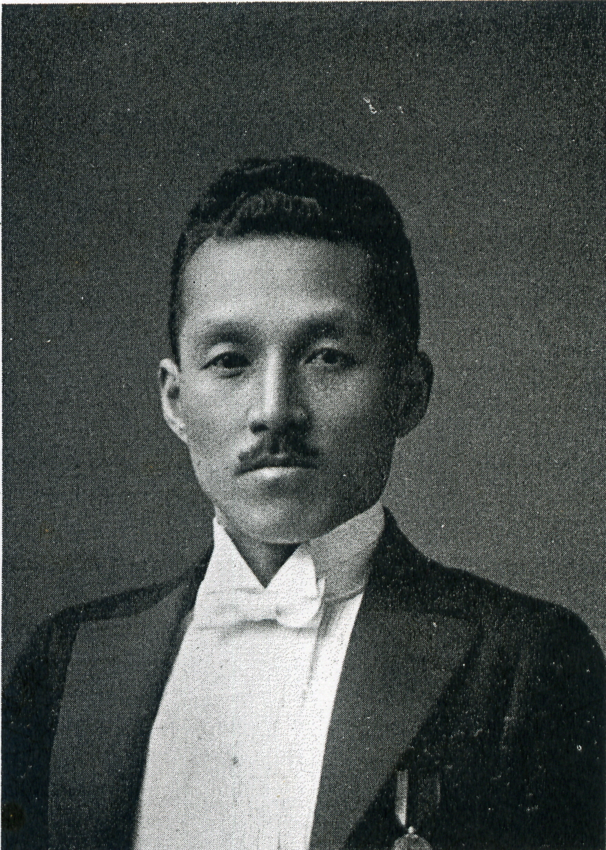 この写真は、片野重脩（1891-1978）の写真です。